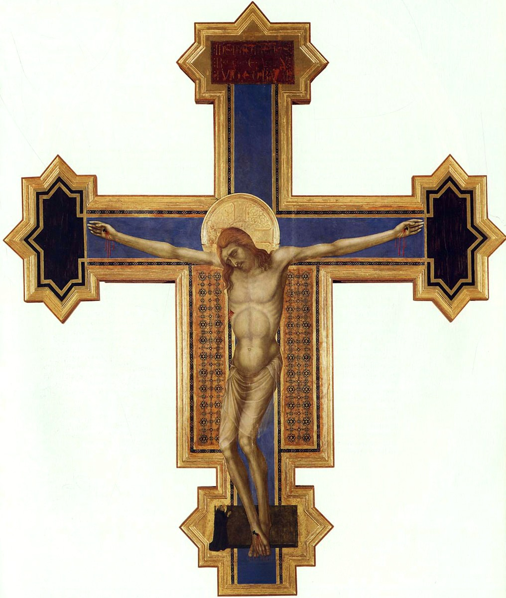 Croce Dipinta